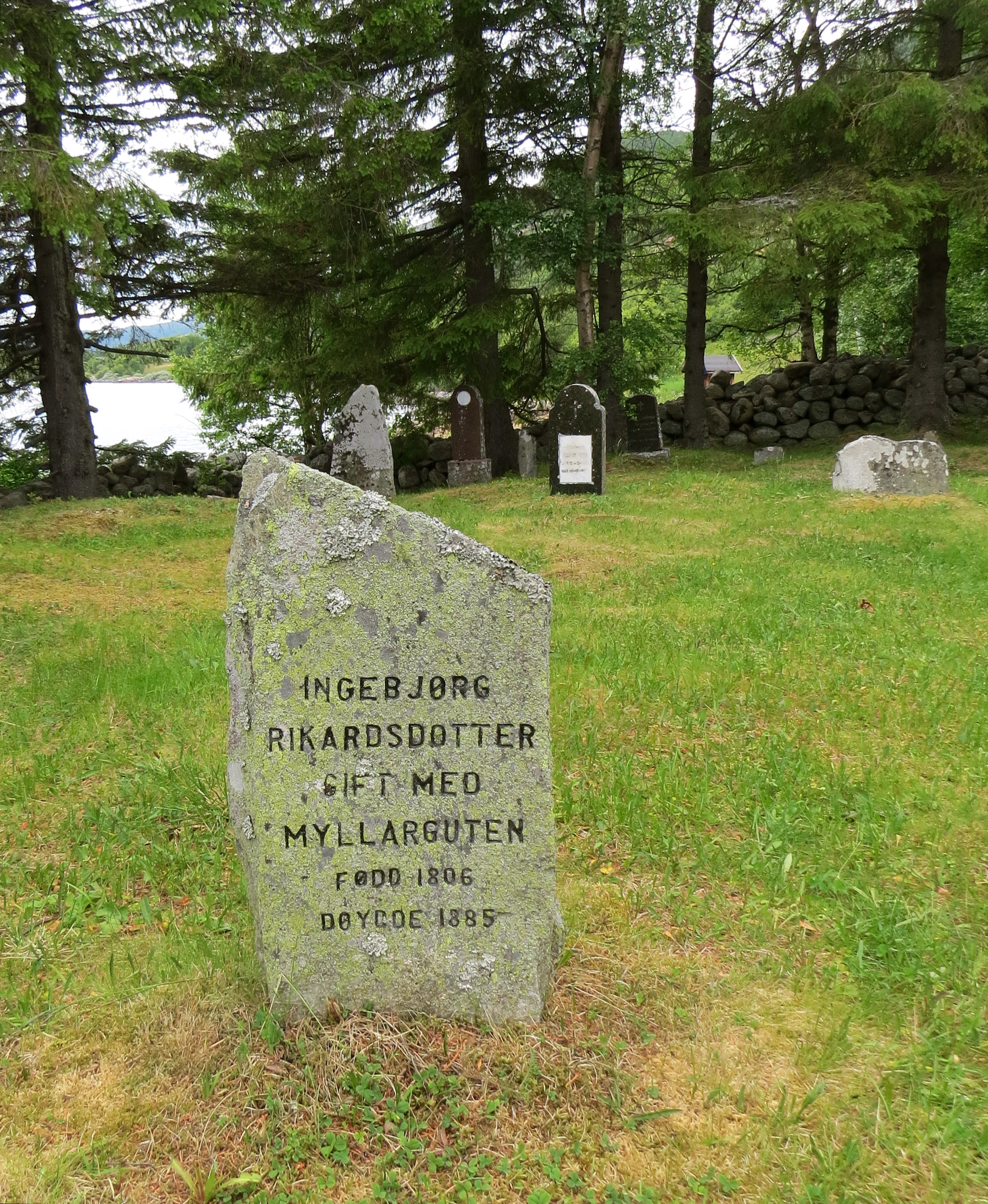 Ingebjørg Rikardsdotter, gift med, Myllarguten, fødd 1806, døygde 1885, Rauland Kirke, Telemarken